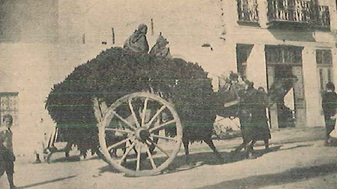 Cart loaded with dried peppers, 1950. Bibliothèque de Travail. N°119. 15 juin 1950.